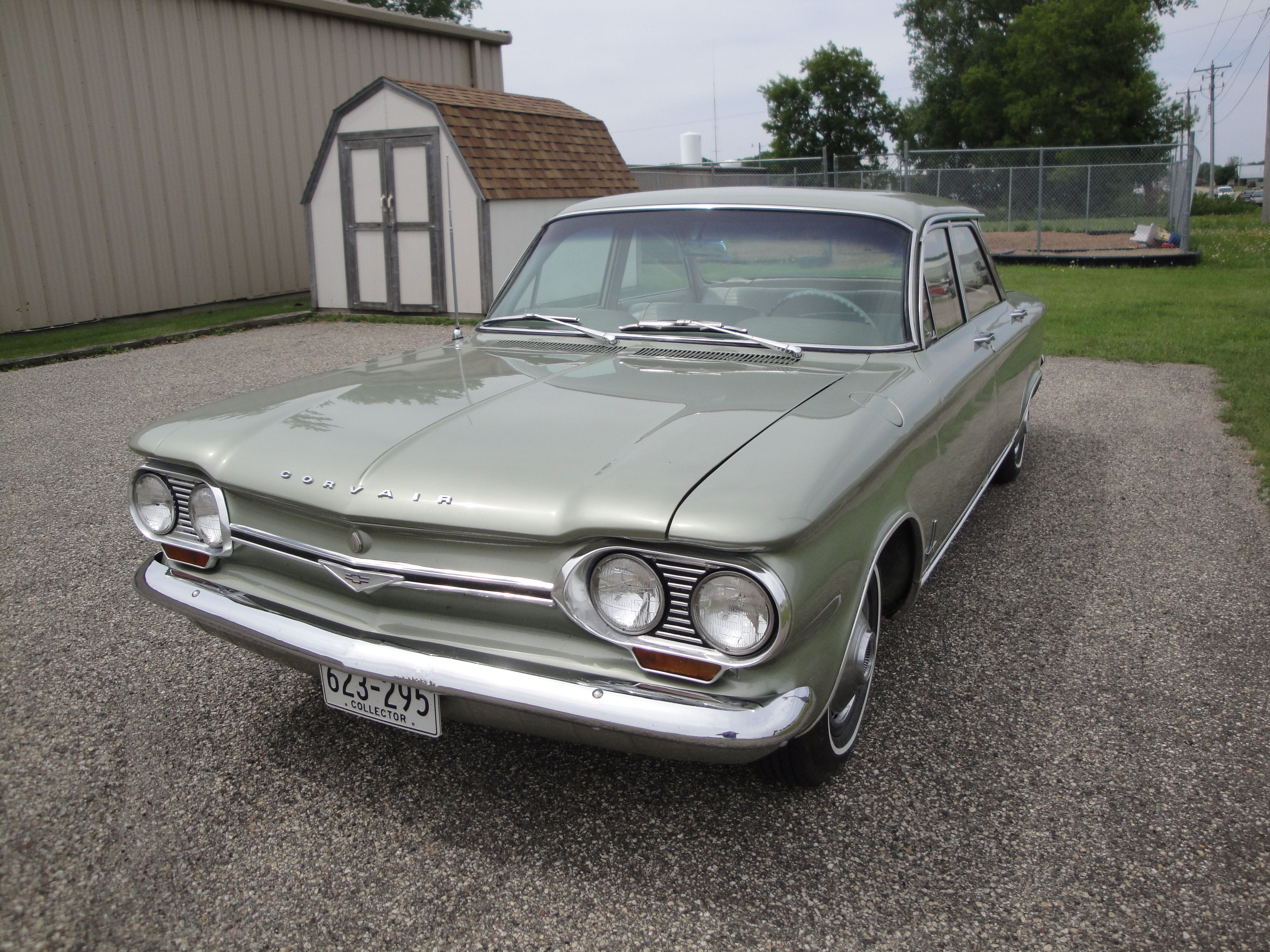 64 Chevrolet Corvair Monza